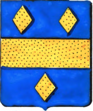 Armes de la famille de Spoelberch. Blasonnement (latin) : "Scutum videlicet coeruleum, trabe aurea secundum latitudinem per medium interiecta in duas partes equales divisum, quarum inferior unum, superior vero duos cubos aureos trigoni in modum dispositos ostentet. Scuto oblique collocato incumbat galea dextram spectans aperta sive clathrata, tornearia vulgo dicta, cancellis ac limbis deaurata, ac phaleris sive laciniis aureis et azureis mixtim circumvolitantibus, nec non corona aurea nostra liberalitate recens superimposita decora, e qua binae alae aquilinae complicatae superius aureae, inferius caeruleae in medio sui cubum itidem aureum comprehendentes exsurgant."